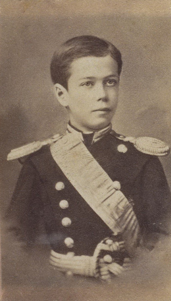 Портрет великого князя Николая Александровича (будущего Николая II) Россия, 1881 г. фотография: альбуминовый отпечаток Размеры: 9,2х5,5; 9,7х6,3 см Поступление: Поступил в 1987 г. Происходит из собрания И.Н. Попова - Т.Б. Александровой Инвентарный номер: ЭРФт-35246